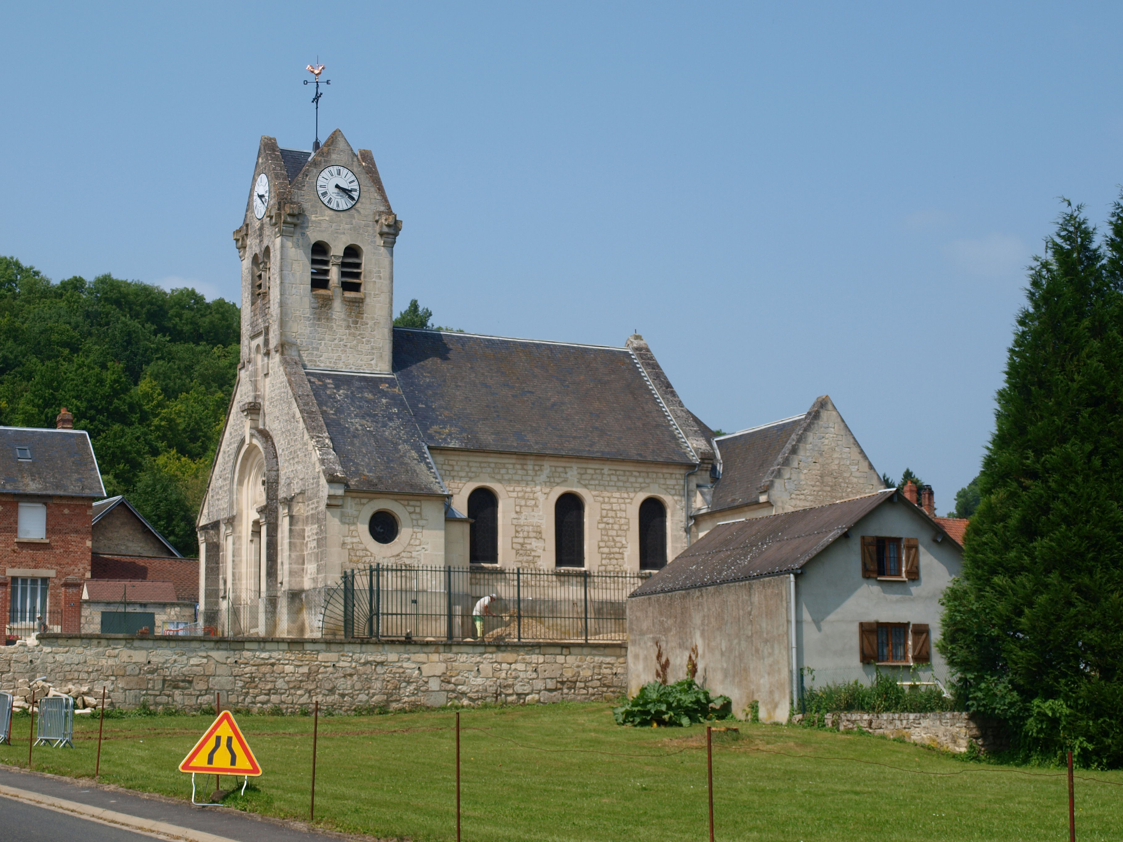 Braye (Aisne, France) ; l'église.